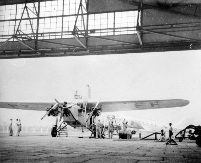 Repronegatief. De Fokker F.VII Pk-AFF te Medan, Noord-Sumatra. Op de achtergrond de KLM Douglas DC-3 PH-ALO "Oehoe"